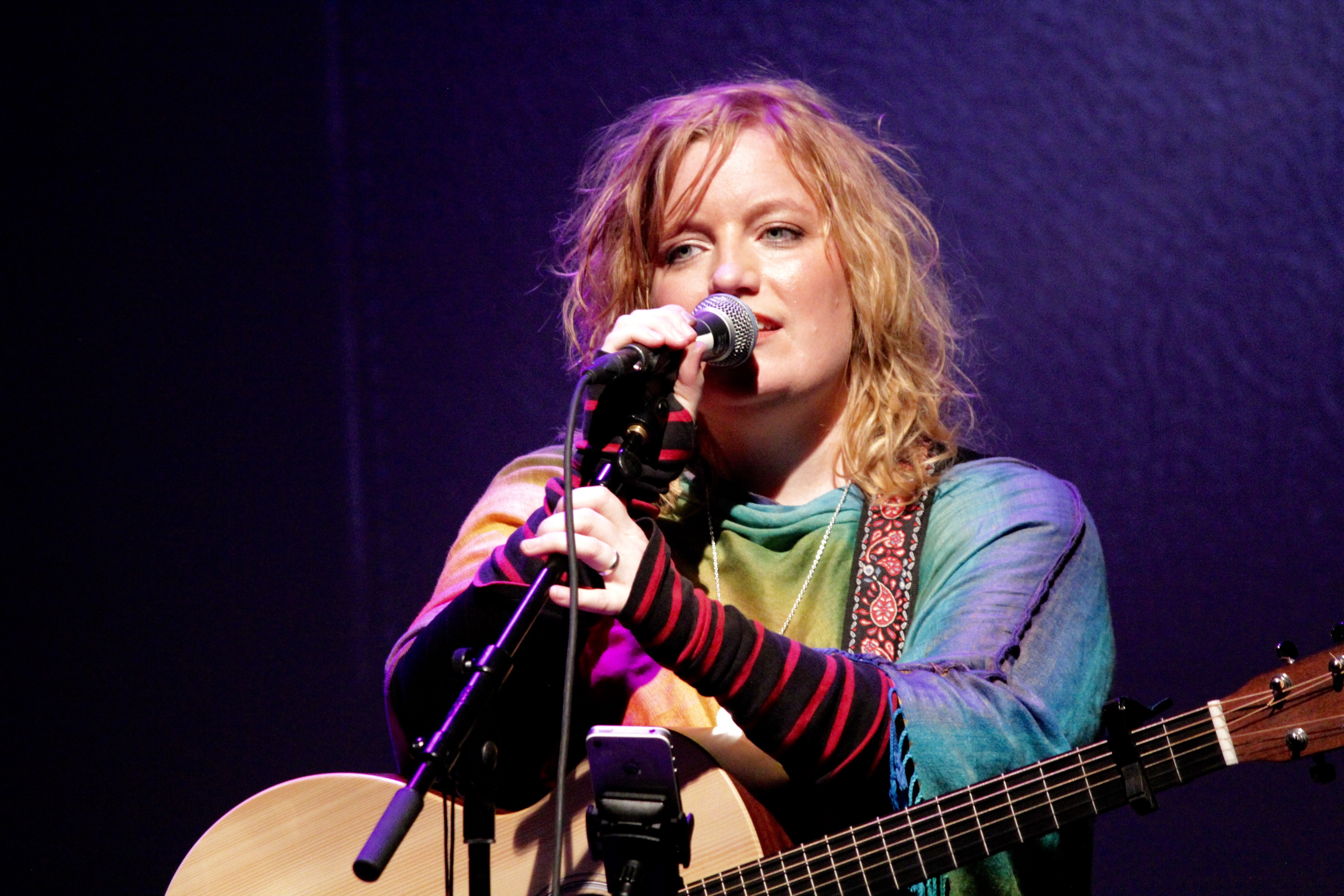 Tina Wilhelmsson på West Pride. Foto: Maria Marre Gustafsson.